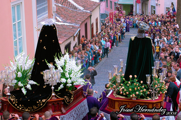 Procesión del Encuentro en la plaza Patricio García, durante la mañana del Viernes Santo. Semana Santa de la Villa de La Orotava.